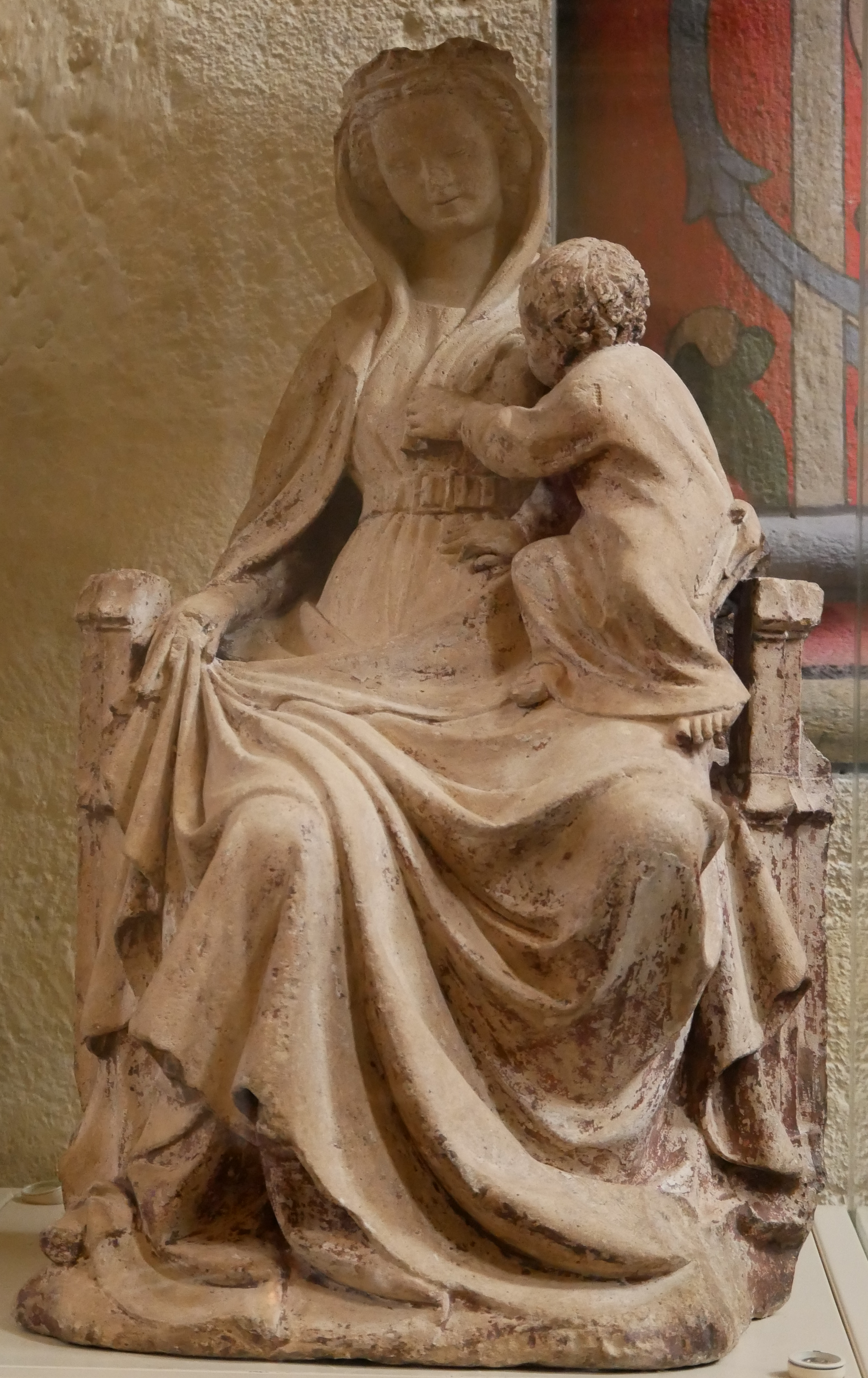 Calcaire parisien polychrome à l'origine, sculptée en Ile-de-France. fin XIVe siècle.